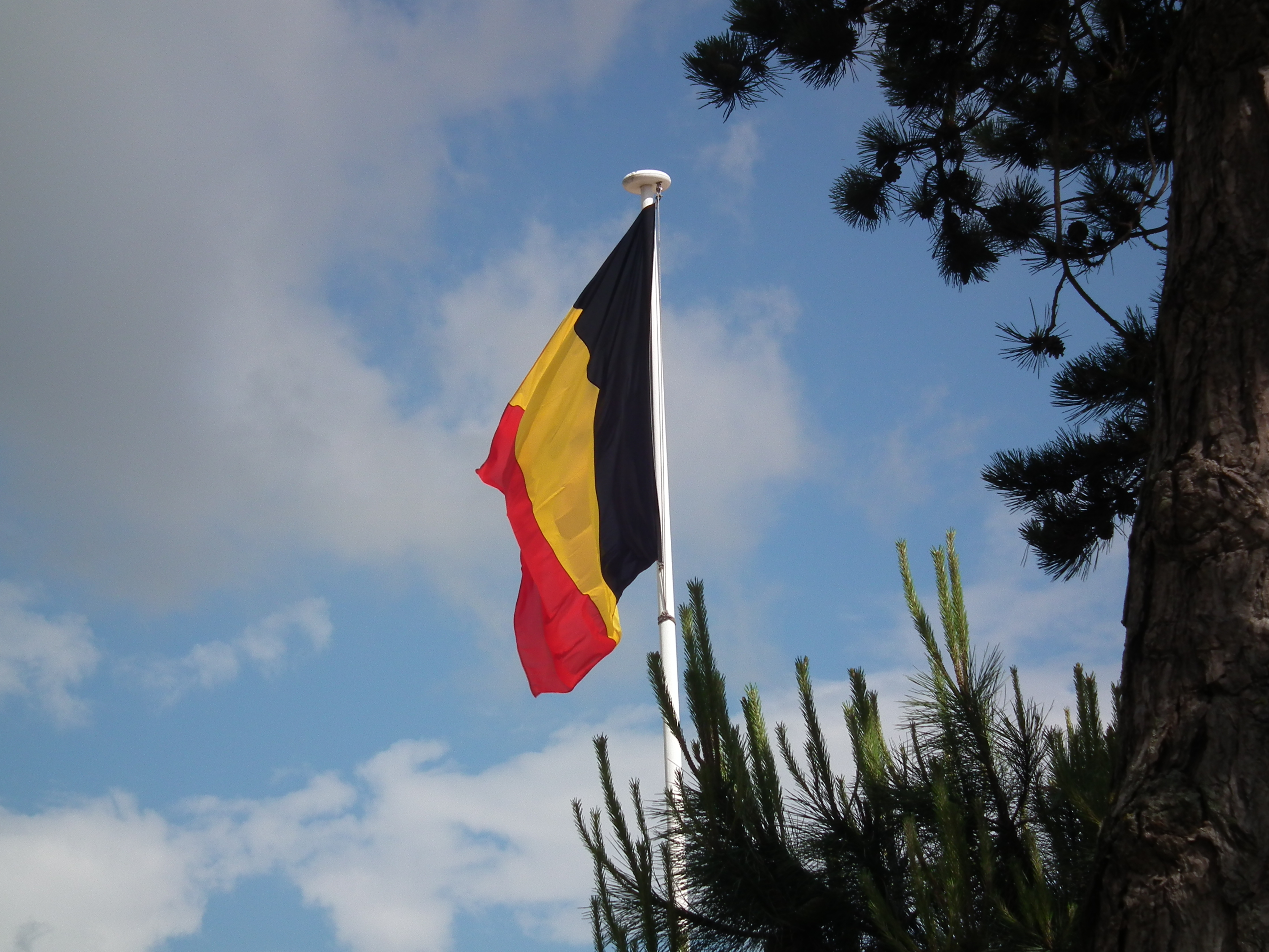 Drapeau belge à Royan